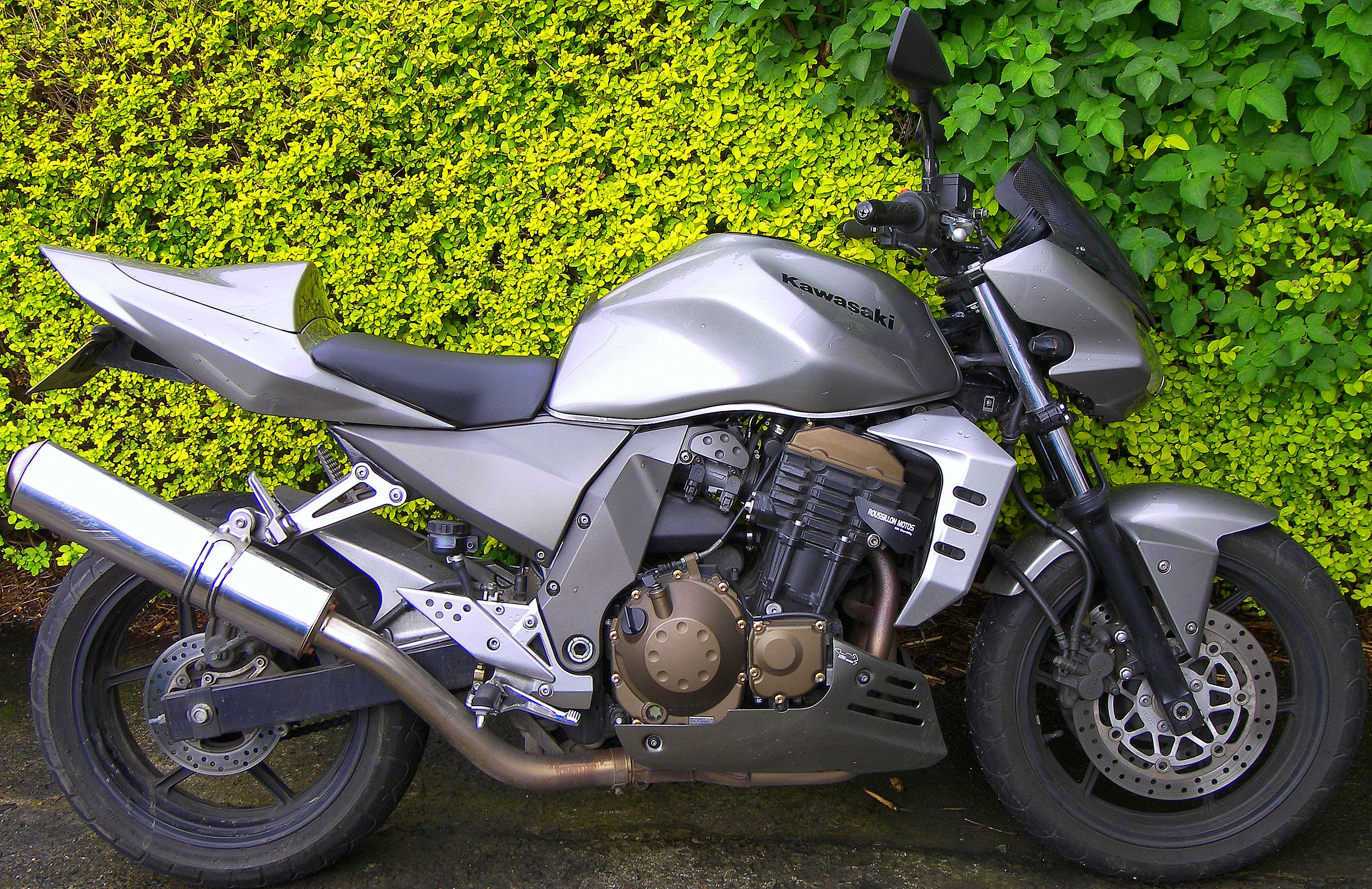 kawasaki z750